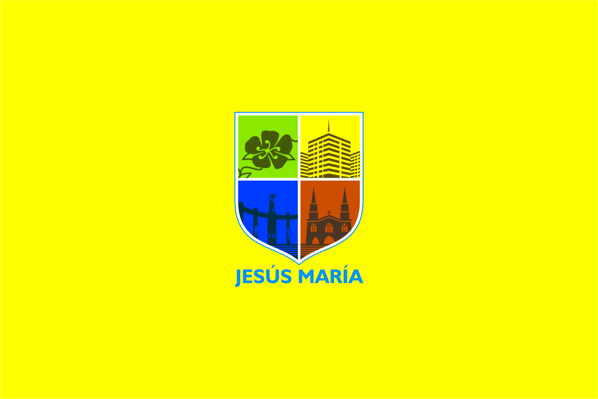 Distrito de Jesús - Provincia de Lima - Región Lima